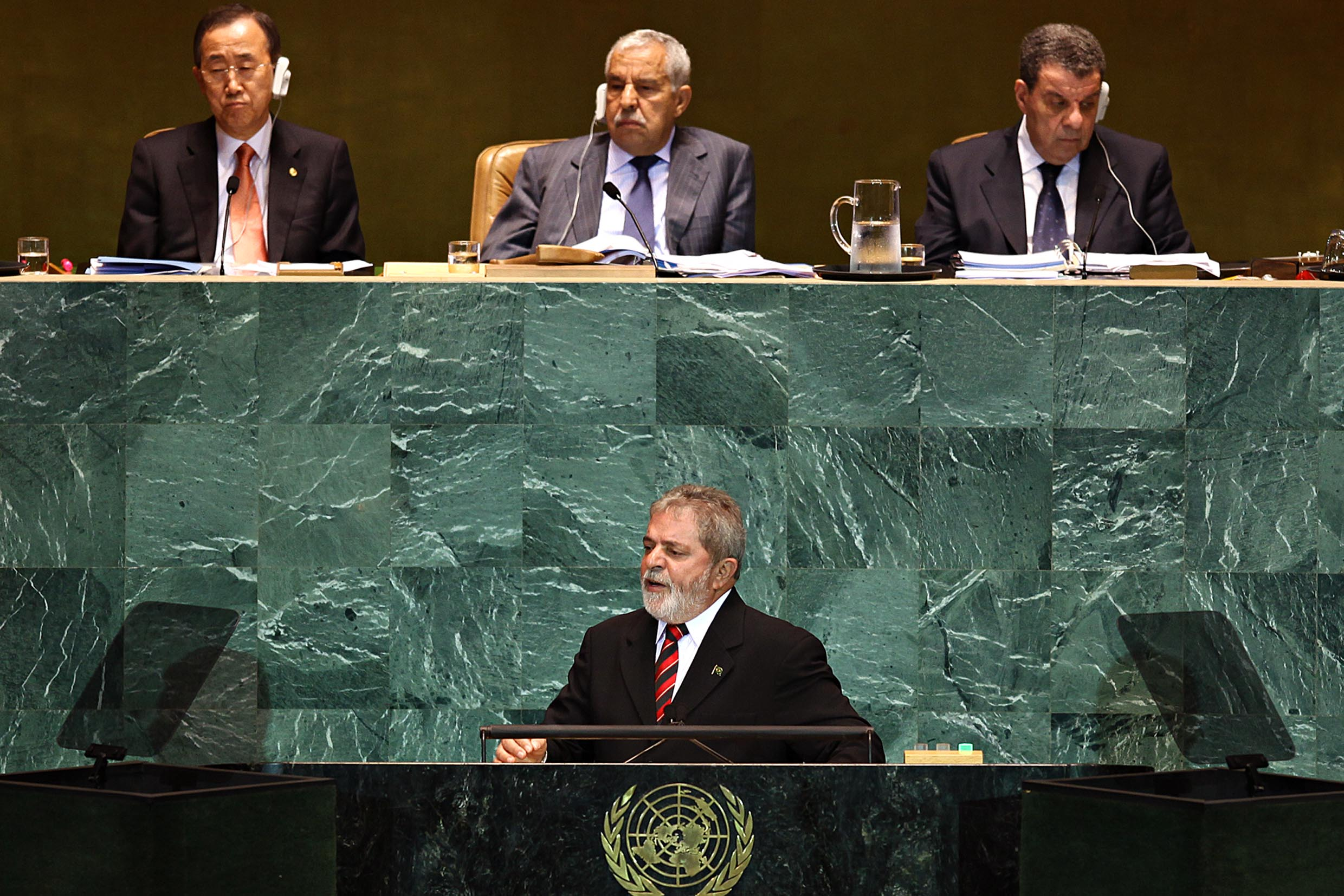 O presidente Luiz Inácio Lula da Silva discursa na abertura da Assembléia Geral da Organização das Nações Unidas (ONU), ele defendeu uma ONU com autoridade política e moral para solucionar conflitos e citou, entre eles, o ocorrido em Honduras